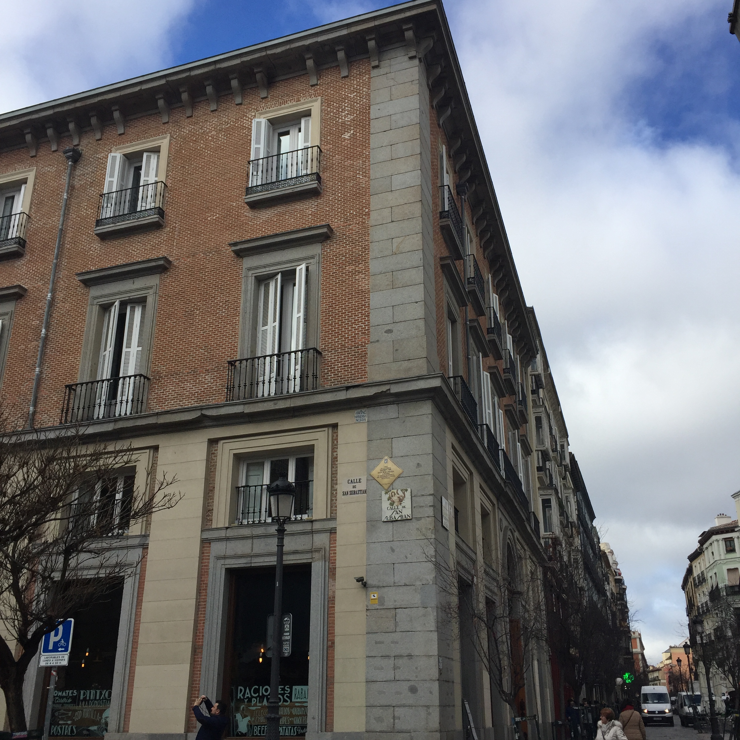 Antigua fonda de San Sebastián, Madrid